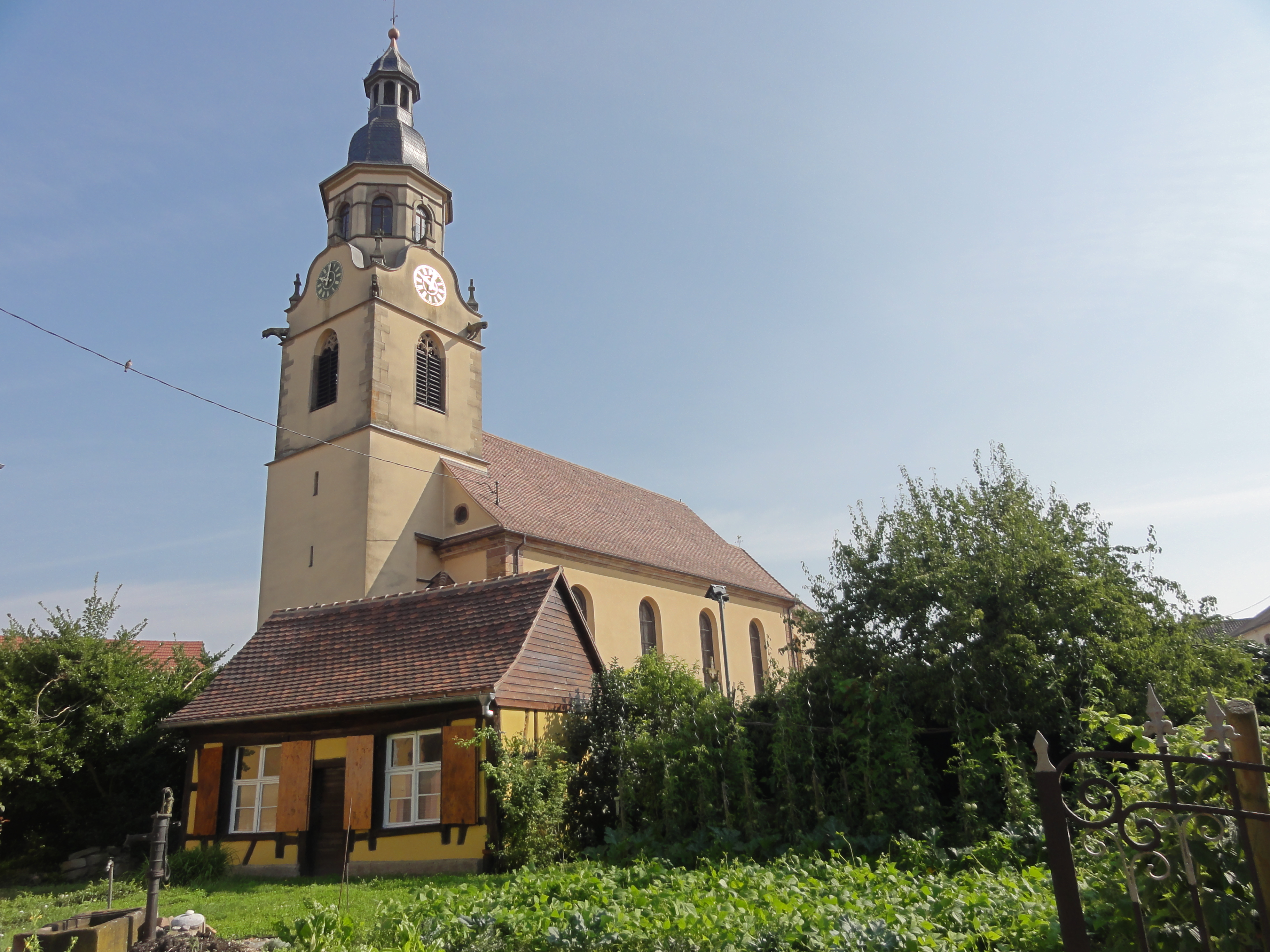 Alsace, Bas-Rhin, Osthouse, Église Saint-Barthélémy (XVe-XVIIIe) (PA00084879, IA00023400).